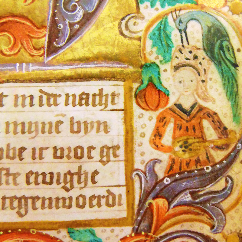 Versieringen bij het begin van de Getijden der eeuwige wijsheid. Rechts naast de tekst is een vrouw afgebeeld. Gent, UB, HS. 2636 folio 70r. Foto: Elvira Ambrosius. Dit boek werd geïllustreerd door de non Stine Dutmers